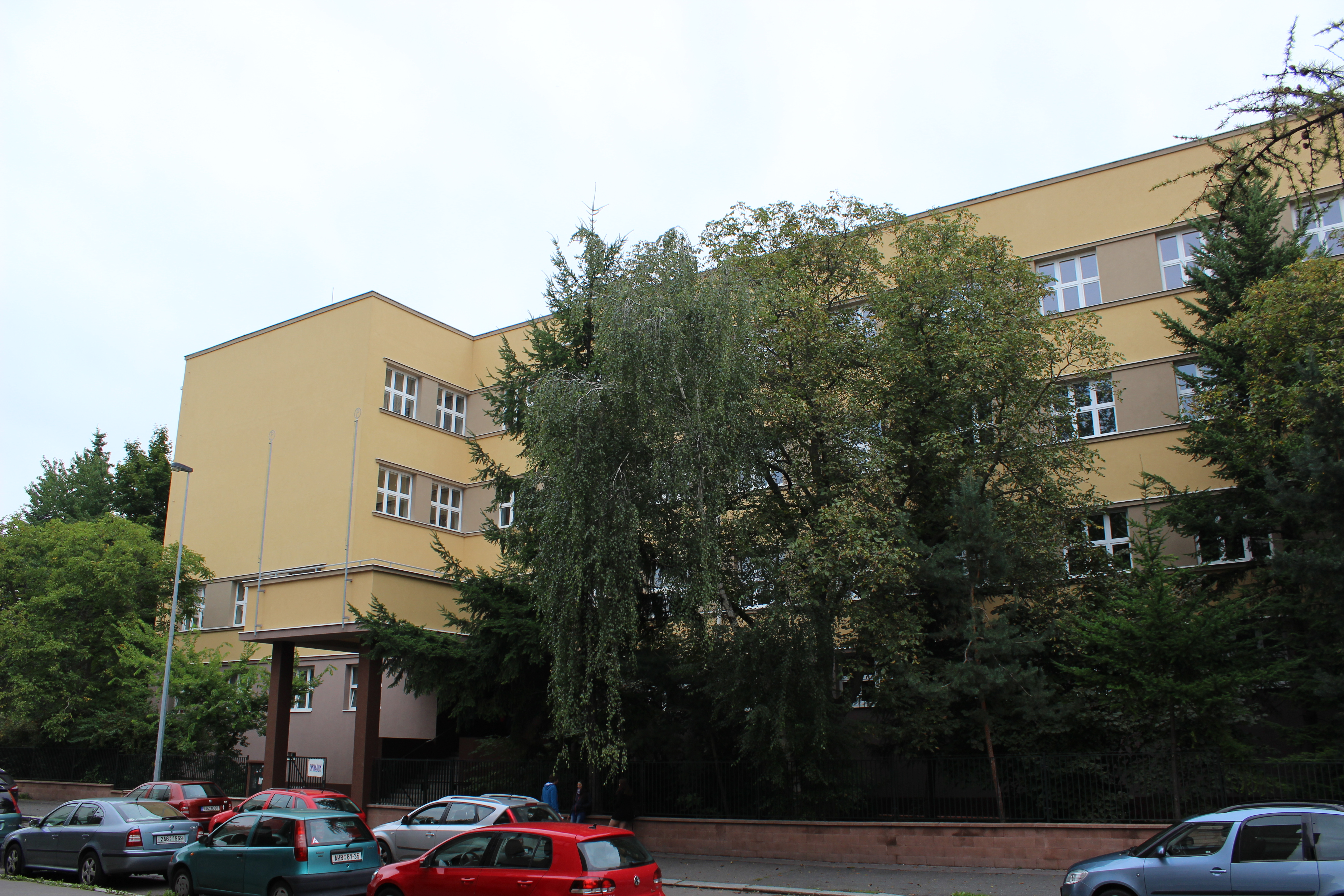 Gymnázium v pražské Voděradské ulici (pohled od jihozápadu).